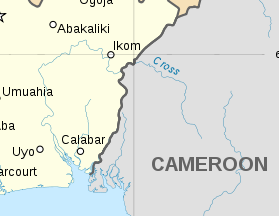 Кросс-ривер река Нигарии